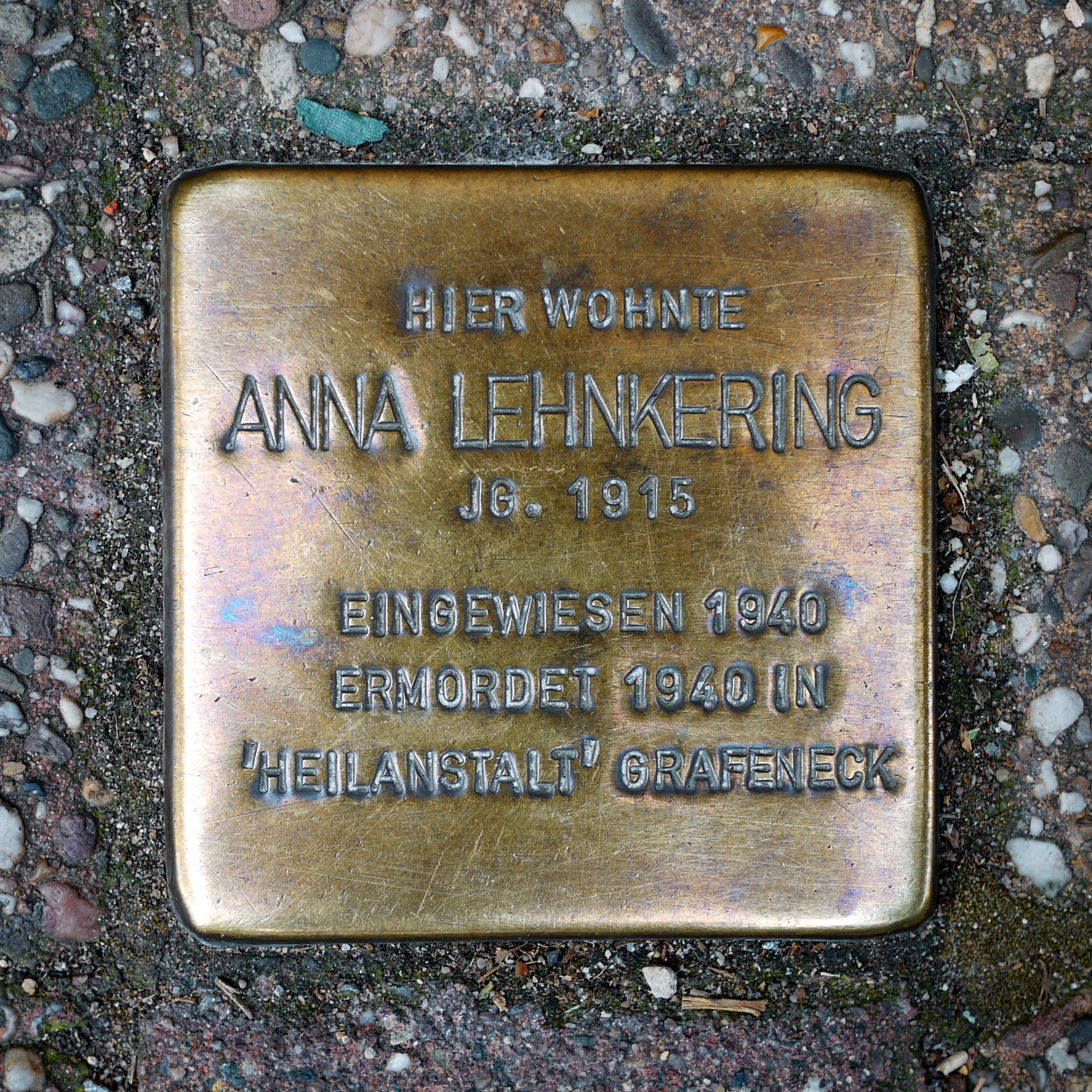 Stolperstein für Anna Lehnkering, vor dem Haus Düsseldorfer Str. 38, Mülheim an der Ruhr (Info-Seite der Stadt MH)